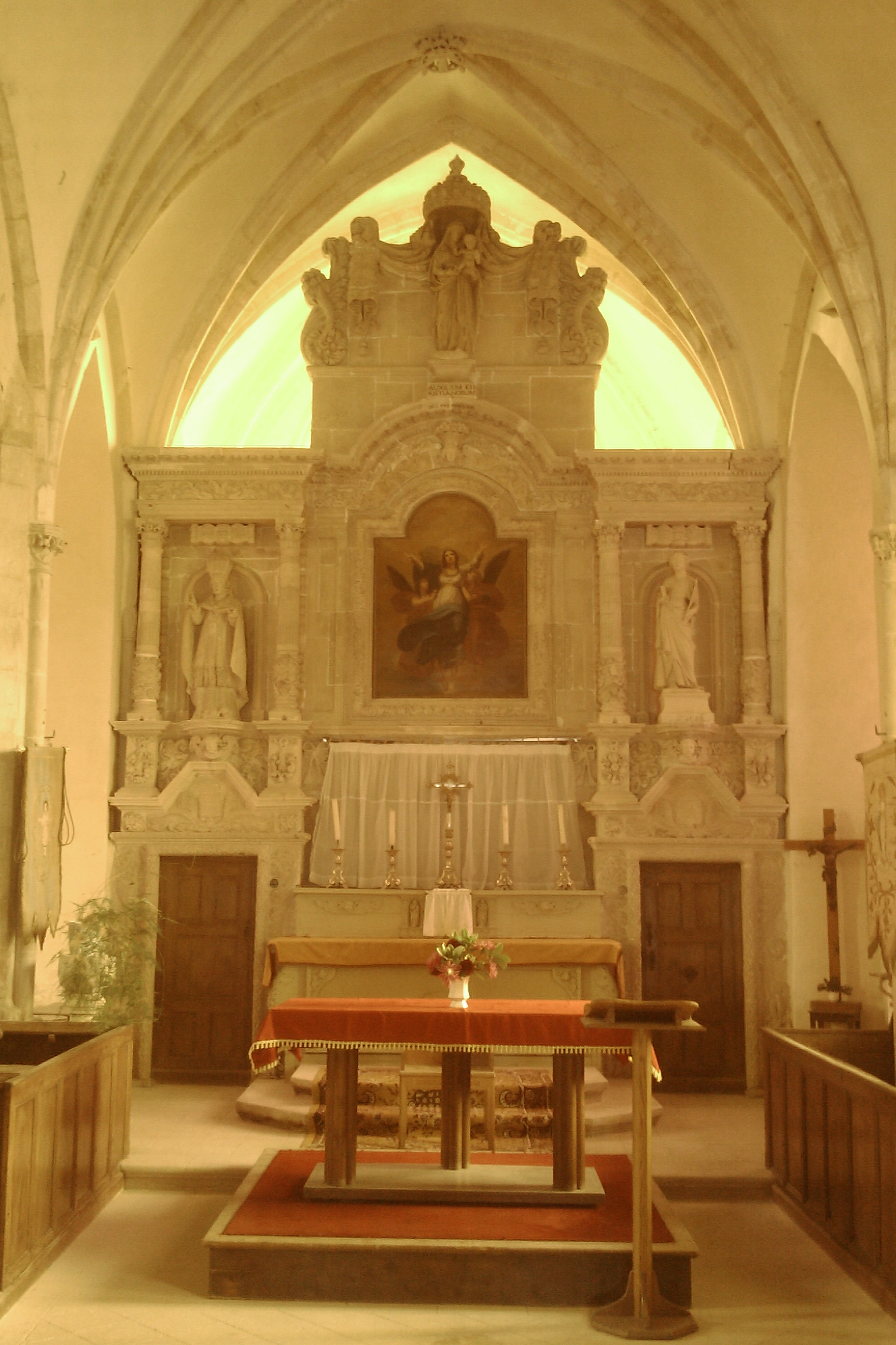 Église paroissiale Notre-Dame d'Émondeville